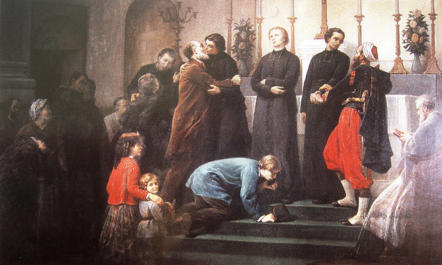 Le Depart